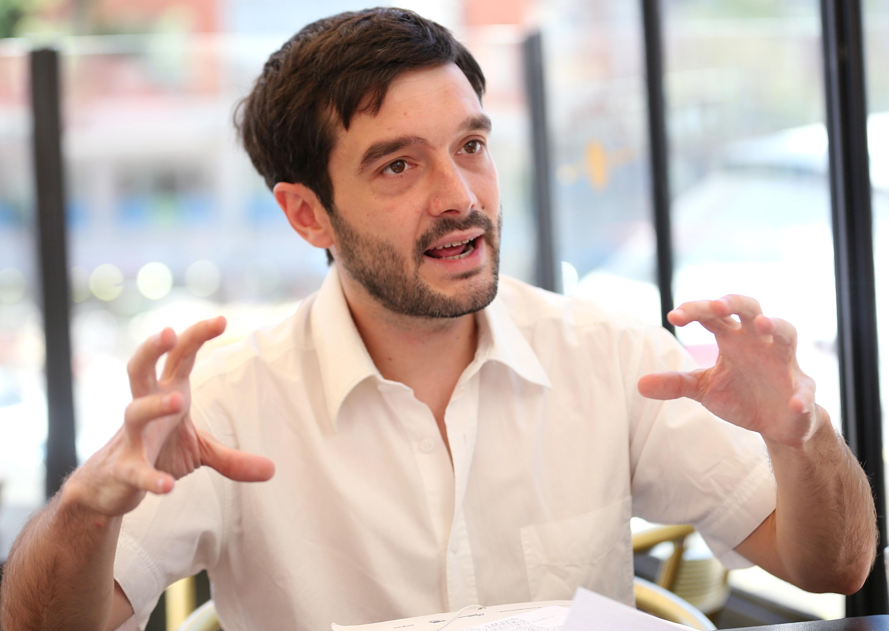 El portavoz de Exteriores de Unidos Podemos asegura que "los tratados de nueva generación modifican sustancialmente el orden constitucional de los Estados"